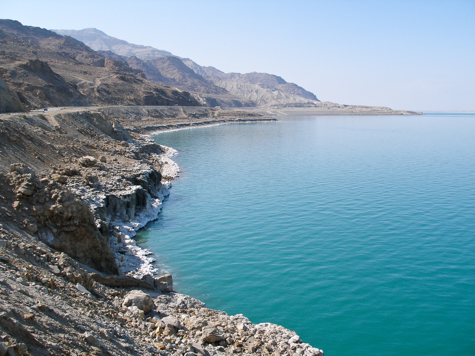 Иорданское побережье Мертвого моря